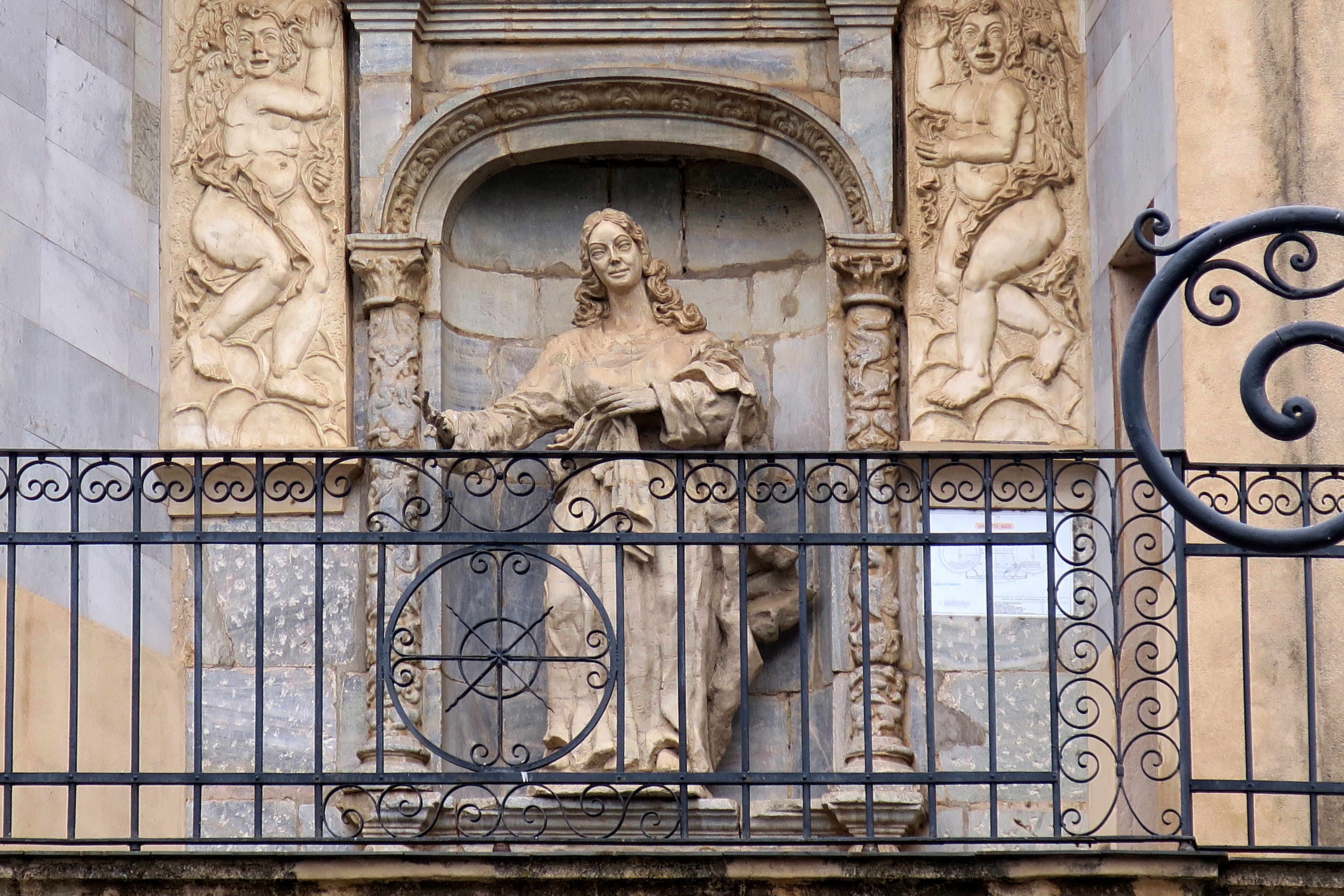 Guillermo Silveira (1922-1987). Virgen de los Ángeles más dos bajorrelieves laterales, 1960. Aglomerado de polvo de mármol. Puerta de Palmas, Badajoz.